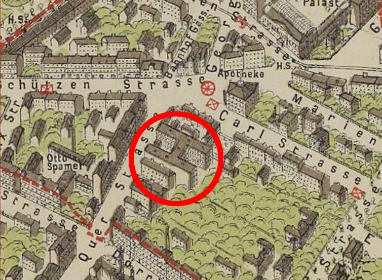 Thiemes Hof (markiert) auf einem Ausschnitt aus dem Stadtplan von Leipzig von 1884